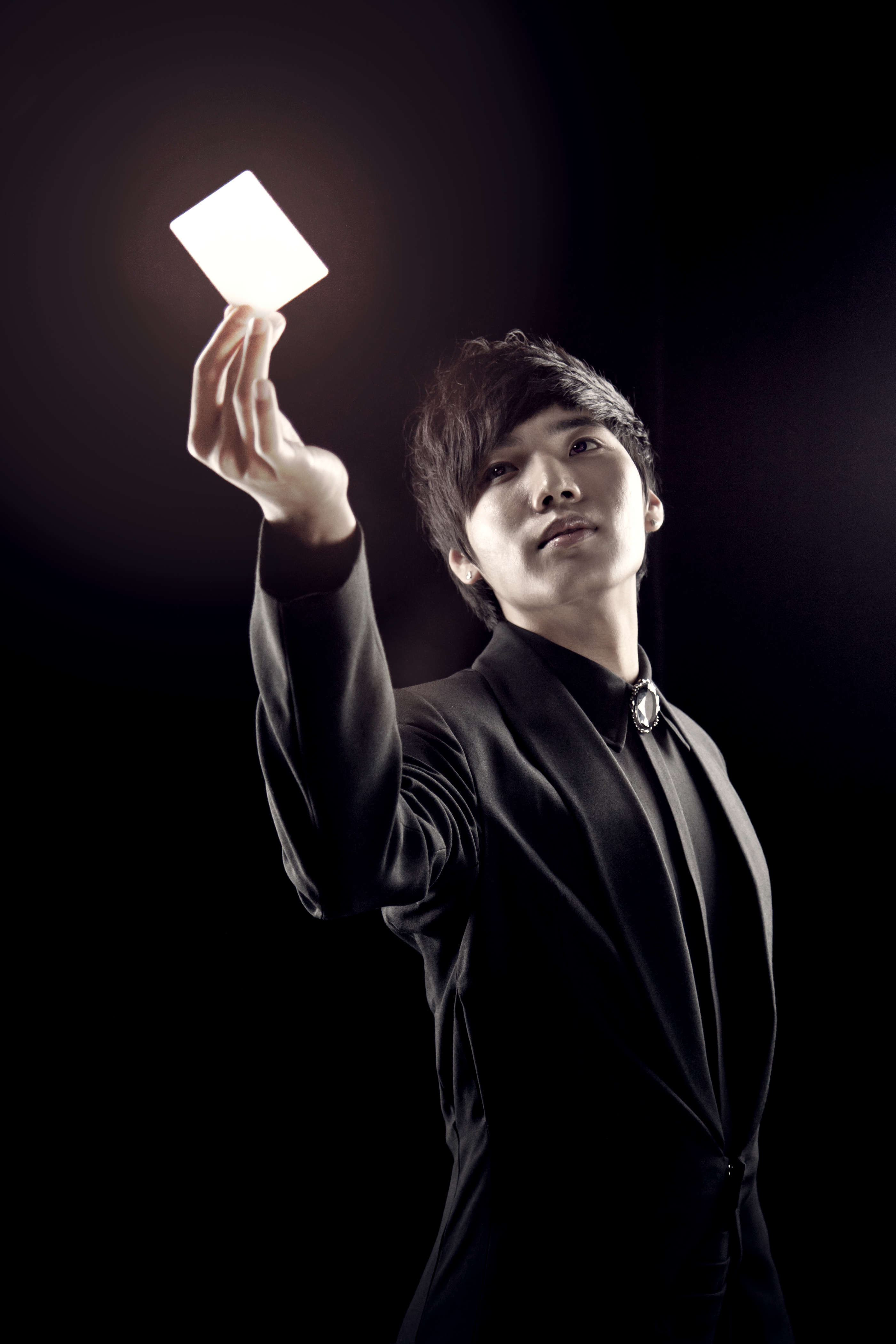 마술사유호진